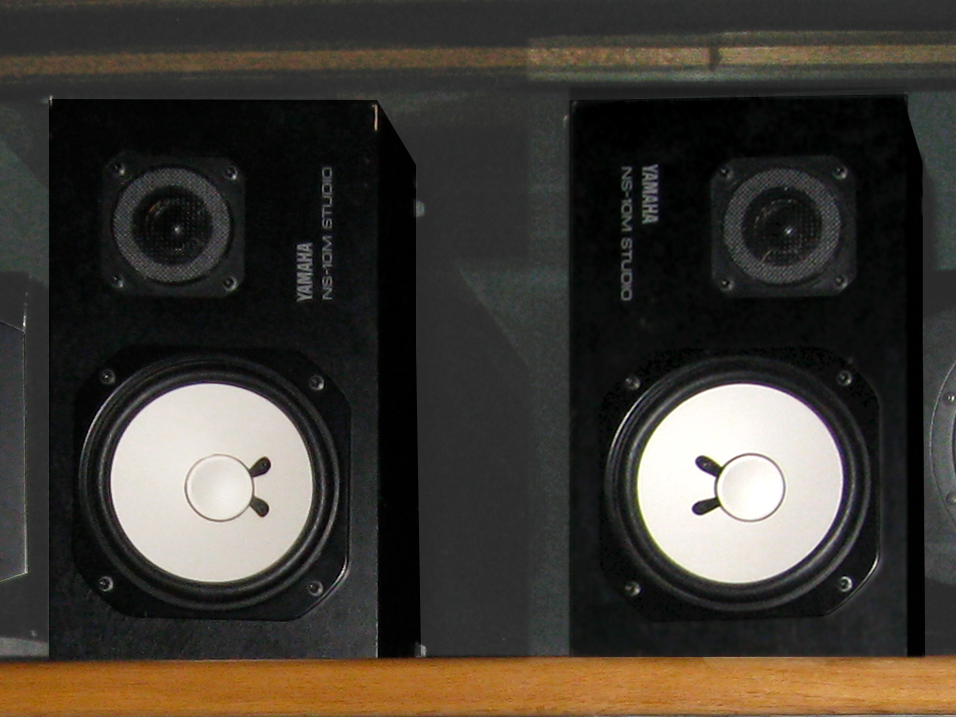 Yamaha NS-10M STUDIO Supernatural Sound